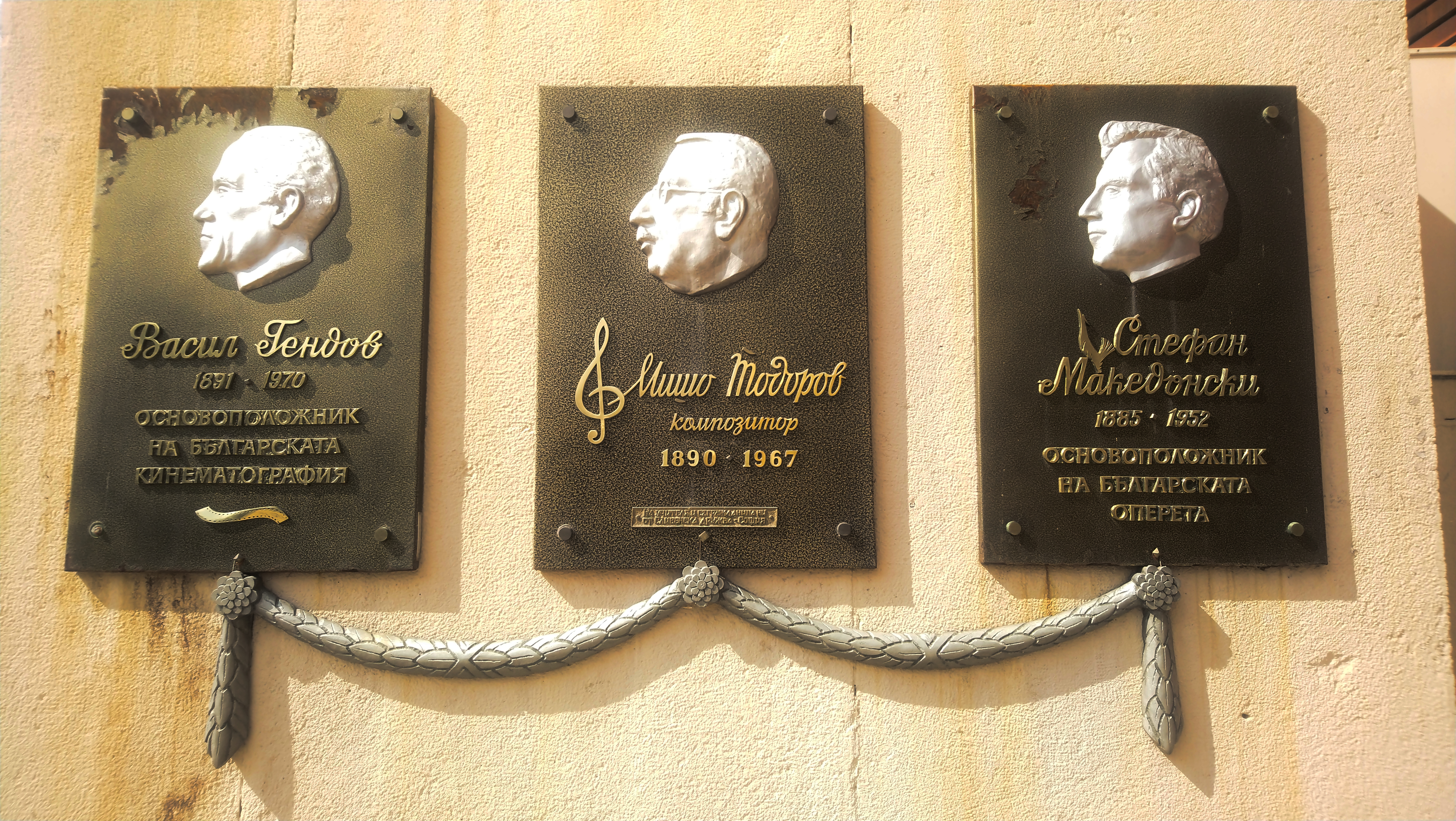 Ансамбъл паметни плочи на Васил Гендов, Мишо Тодоров и Стефан Македонски в центъра на Сливен